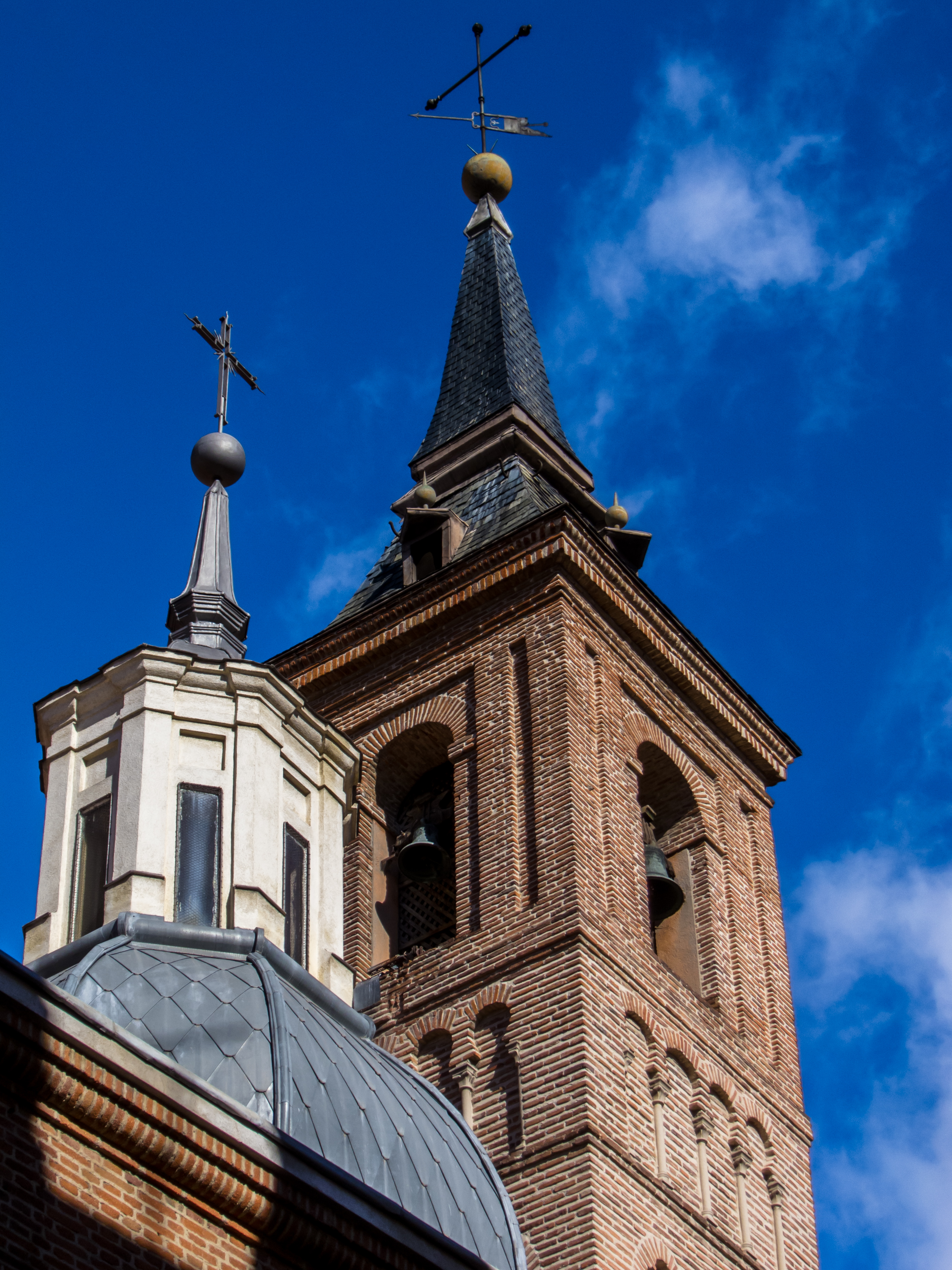 Iglesia de San Nicolás de los Servitas, Madrid.